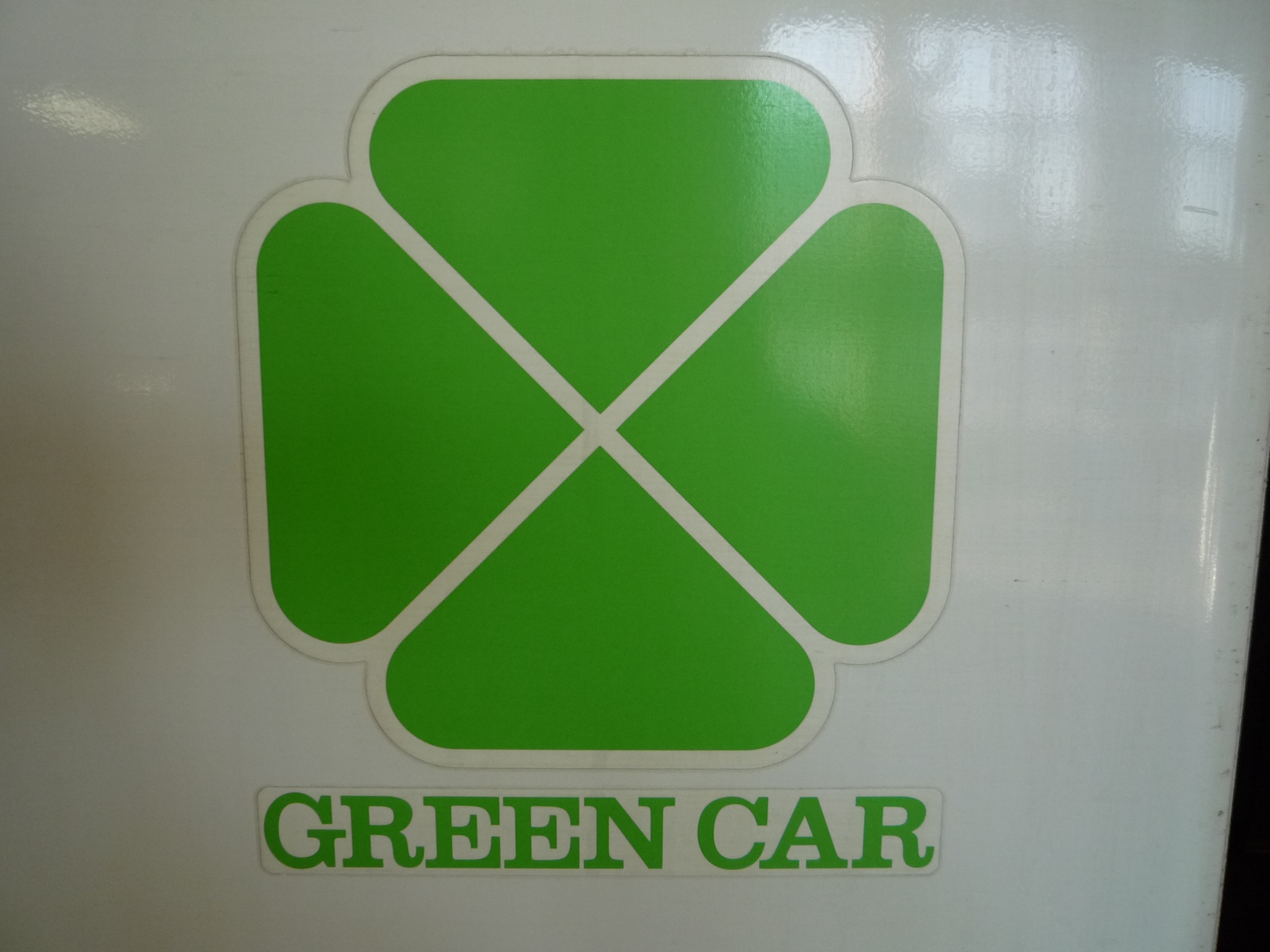 N700系グリーン車のマーク